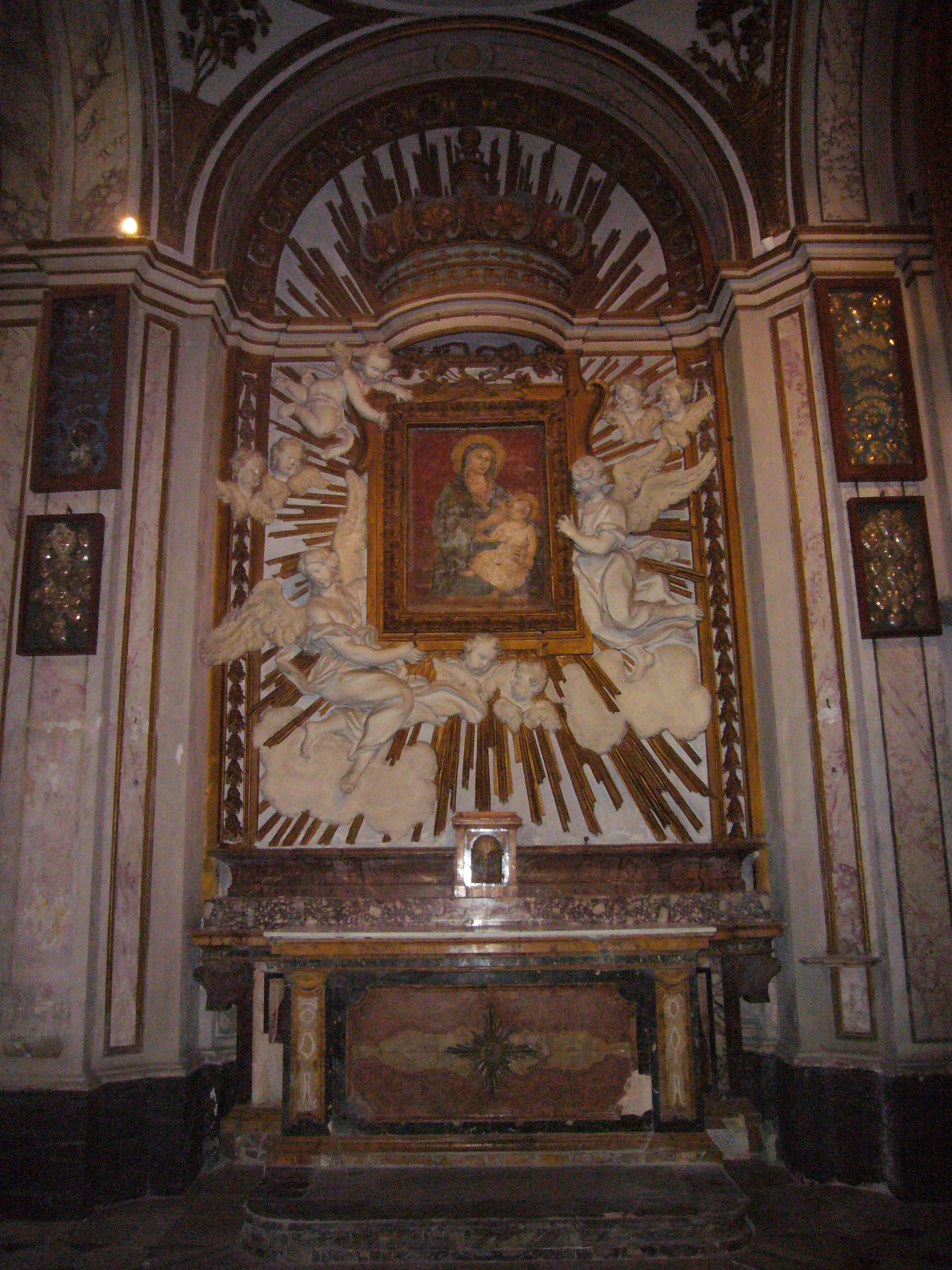 Roma, San Paolo alla Regola: Madonna che allatta, detta "delle Grazie" (XIV sec.)